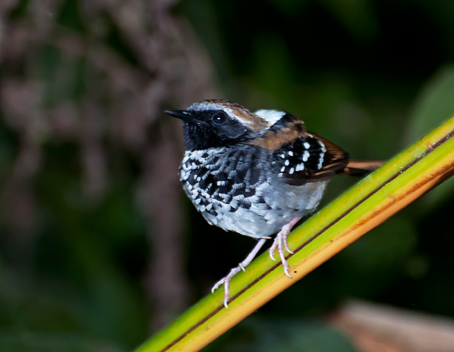 PAPA-FORMIGA-DE-GROTA (Myrmeciza squamosa ) Squamate Antbird